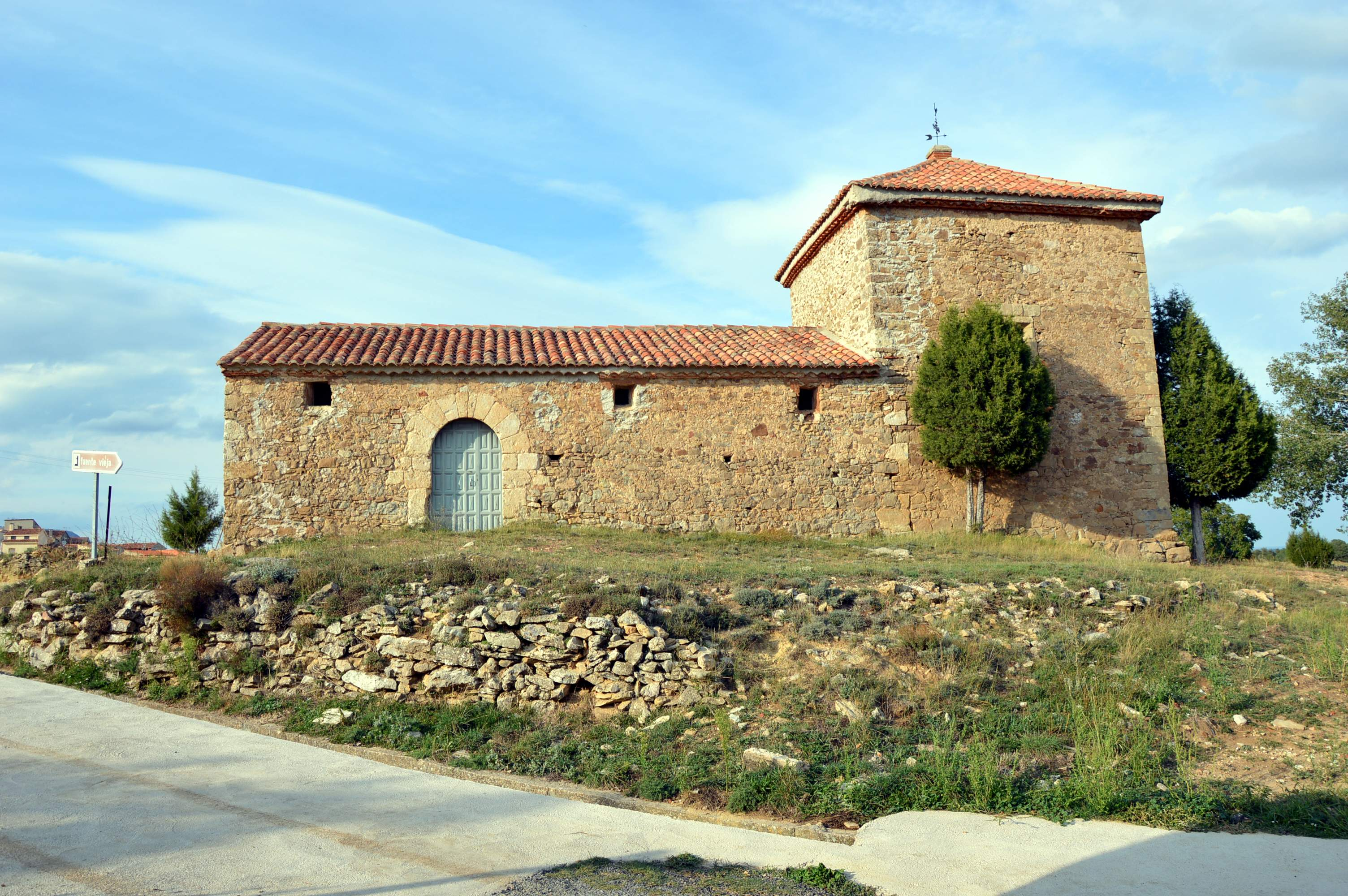 Vista meridional de la ermita de San Marcos, Veguillas de la Sierra (Teruel), con detalle de la entrada.